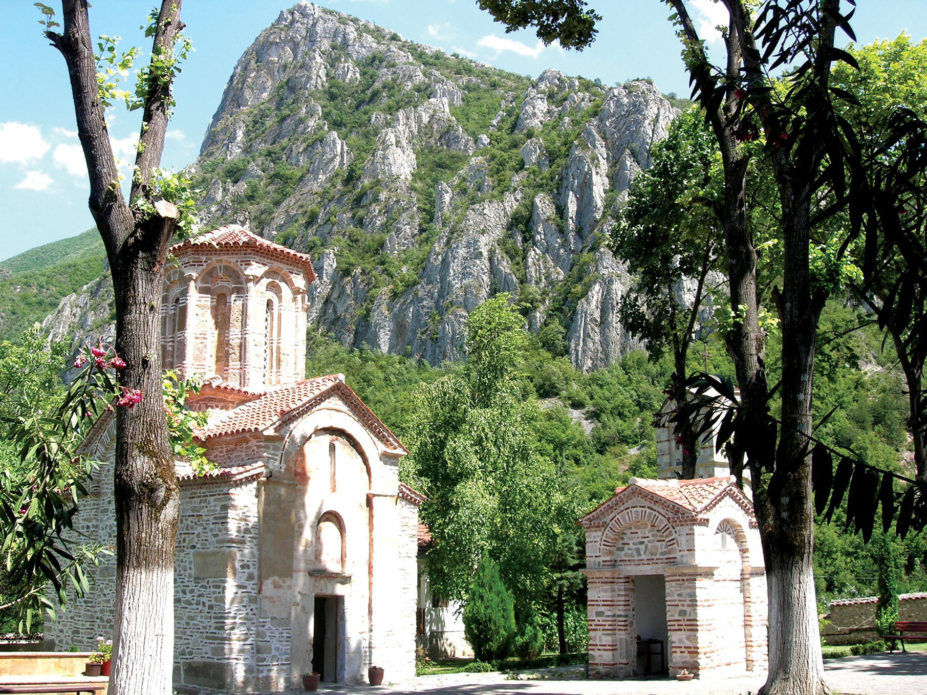 Църквата „Свето Успение Богородично“, Матка, Република Македония.